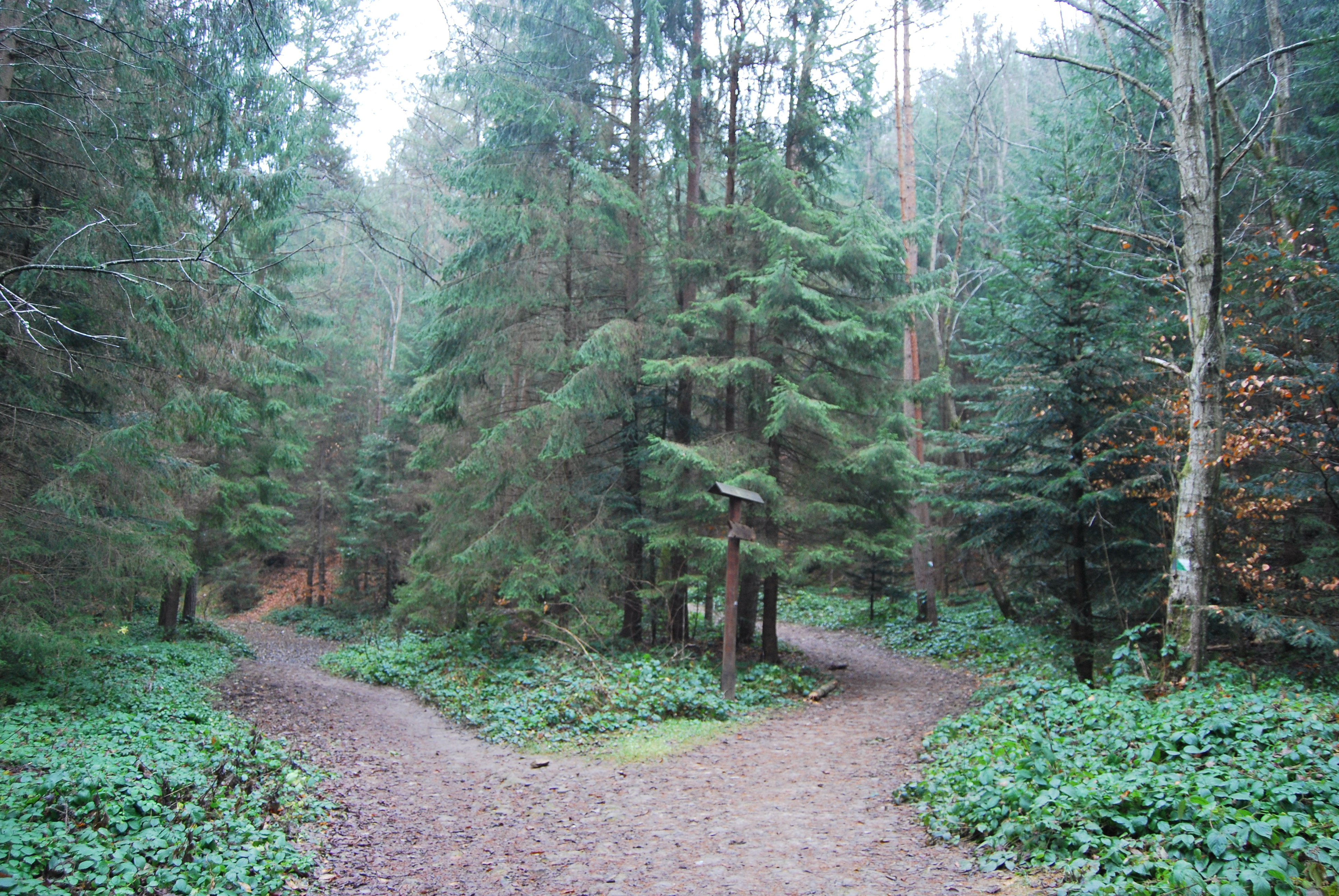 Карпатський, Яремчанська міська рада, Верховинський район, Надвірнянський район